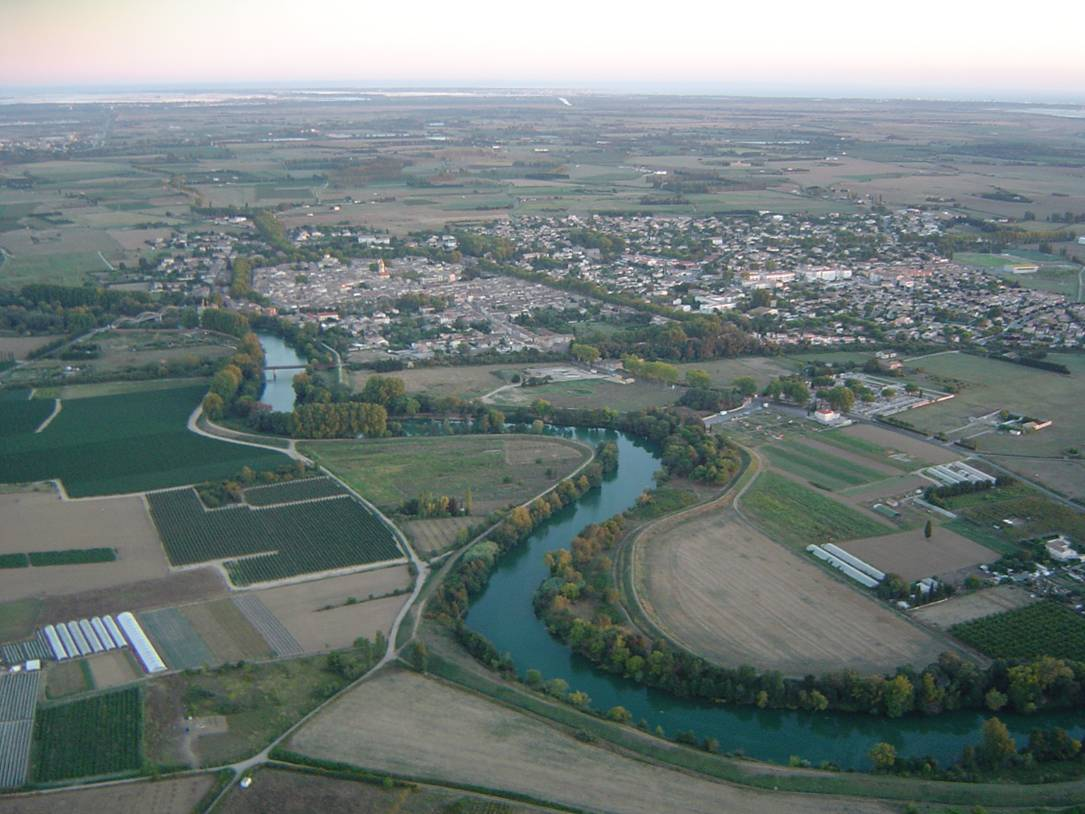 Vue aérienne de Marsillargues (Hérault)